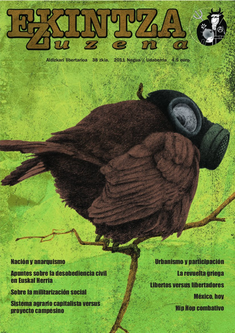 Ekintza Zuzena aldizkari libertarioaren azala. 38 zkia. 2011 negua-udaberria.